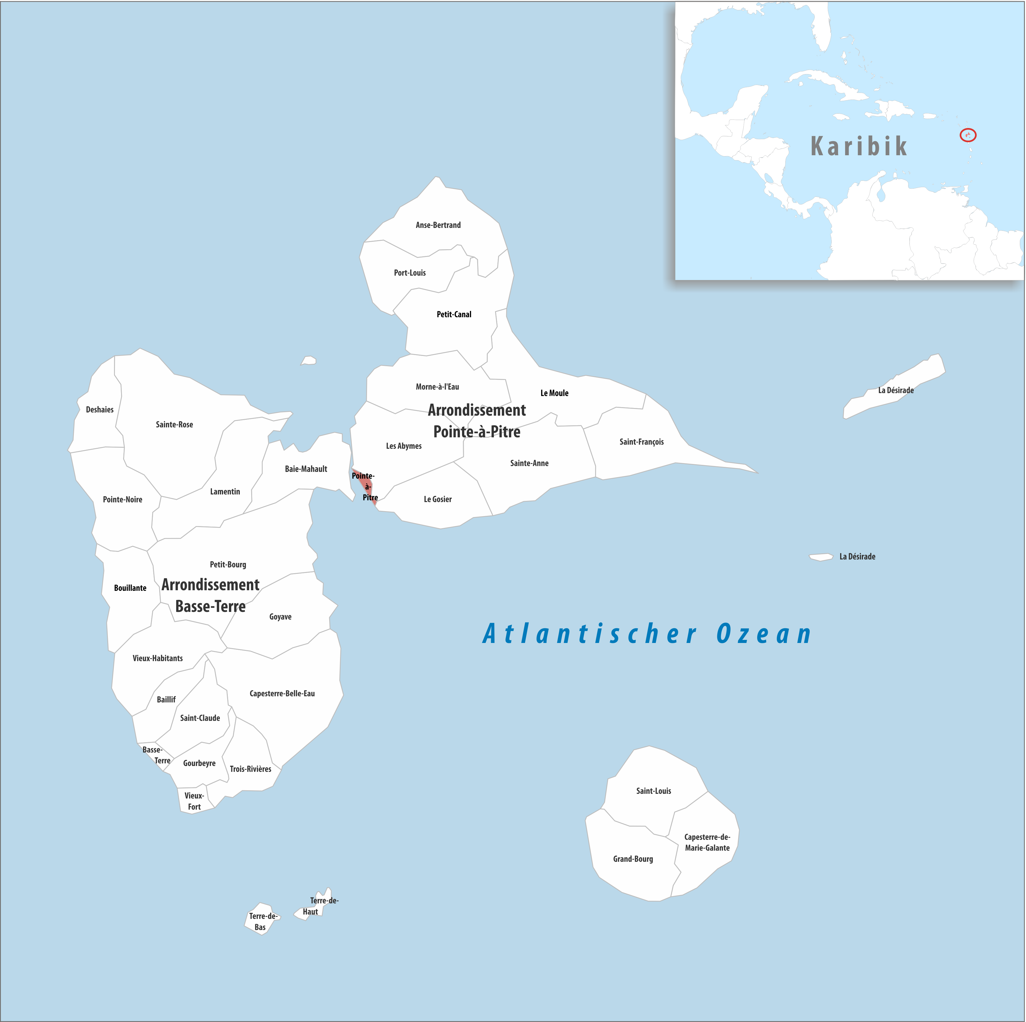 Lage der Gemeinde Pointe-à-Pitre